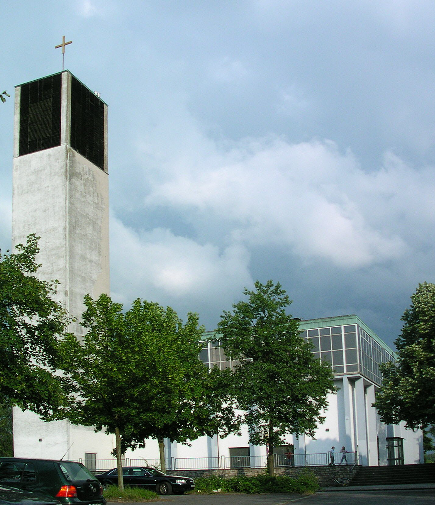 Aachen, evangelische Auferstehungskirche am Kupferofen (abgekupfert von Rudolf-Schwarz-Kirchen). Architekt: Gerhard Langmaack